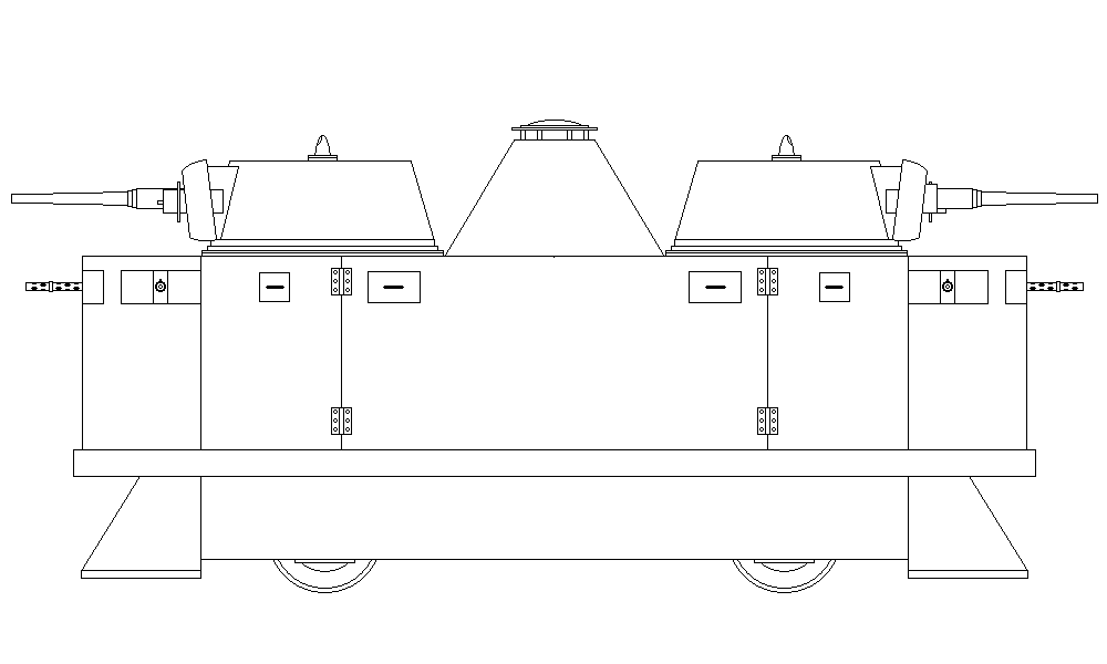 Pansardressin designad av Landsverk